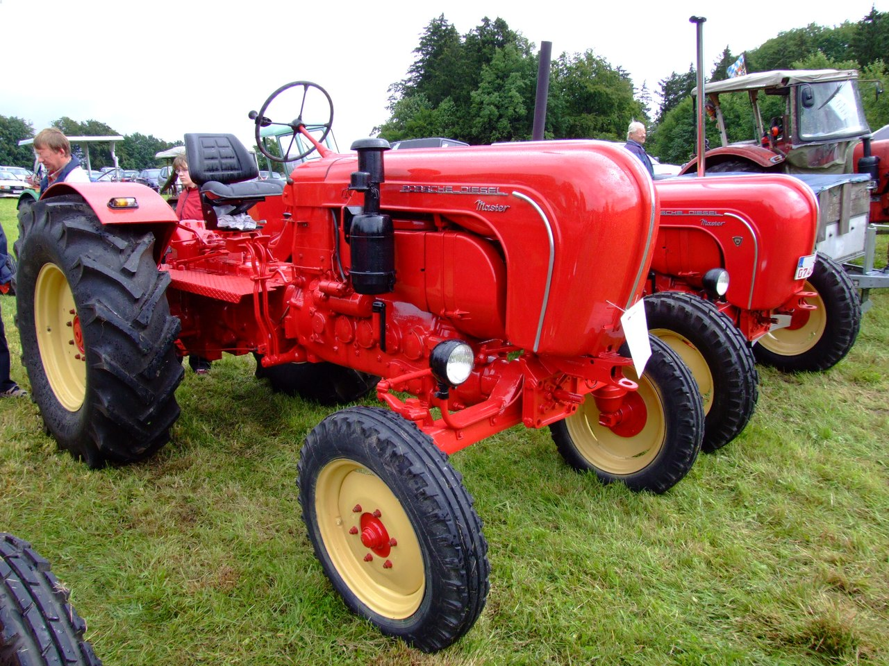 Porsche-Diesel Master F418 mit 50 PS, Baujahr 1960, Leergewicht: 2200 kg, Besonderheit: Schnellgang 40 km/h